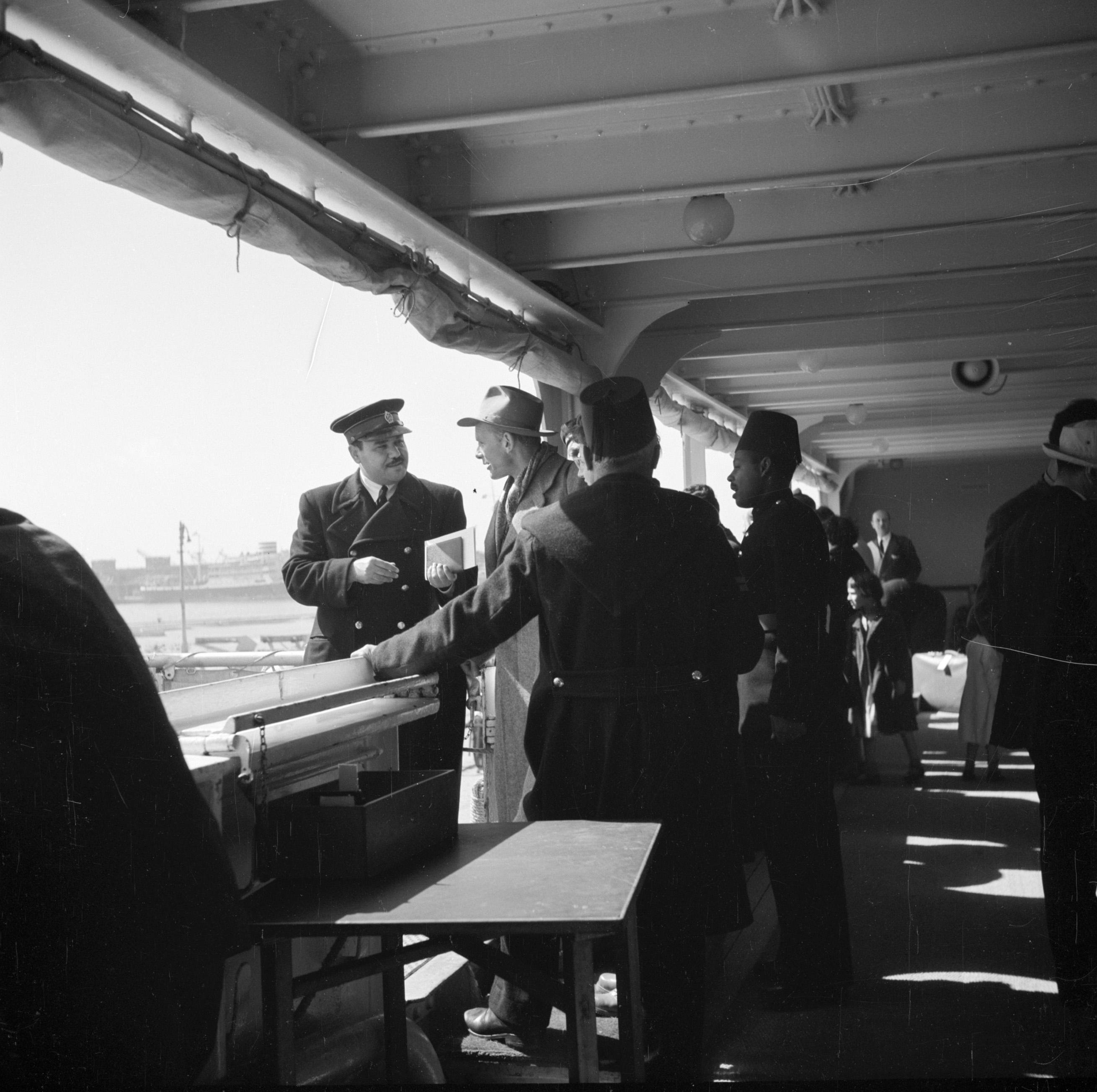 Collectie / Archief : Fotocollectie Van de Poll Reportage / Serie : [ onbekend ] Beschrijving : Controle bij het van boord gaan van passagiers in de haven van Alexandrië Datum : ongedateerd Locatie : Alexandrië, Egypte Trefwoorden : douane, havens, reizigers, schepen Fotograaf : Poll, Willem van de Auteursrechthebbende : Nationaal Archief Materiaalsoort : Negatief (zwart/wit) Nummer archiefinventaris : bekijk toegang 2.24.14.02 Bestanddeelnummer : 252-1709